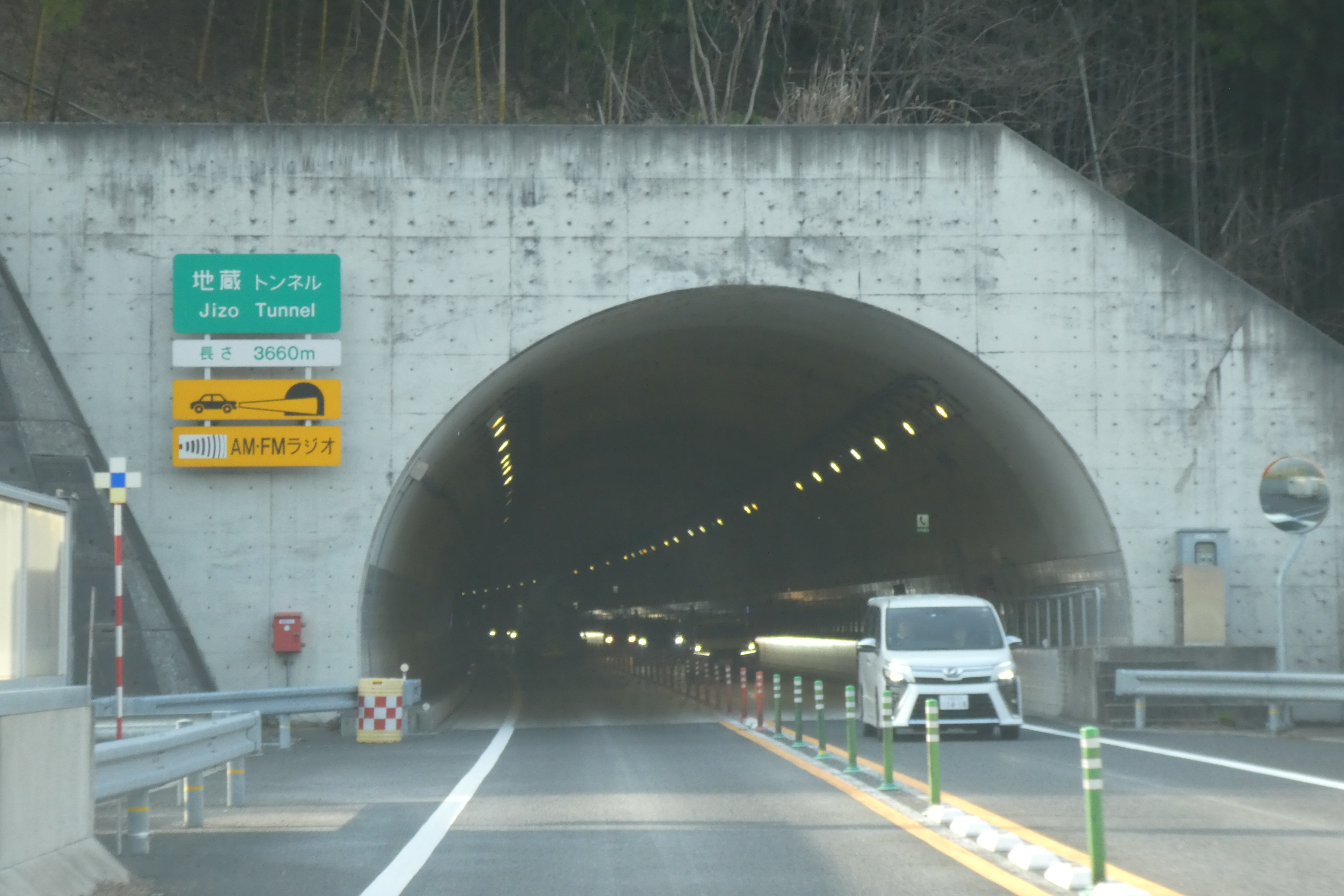 山陰近畿自動車道 地蔵トンネル